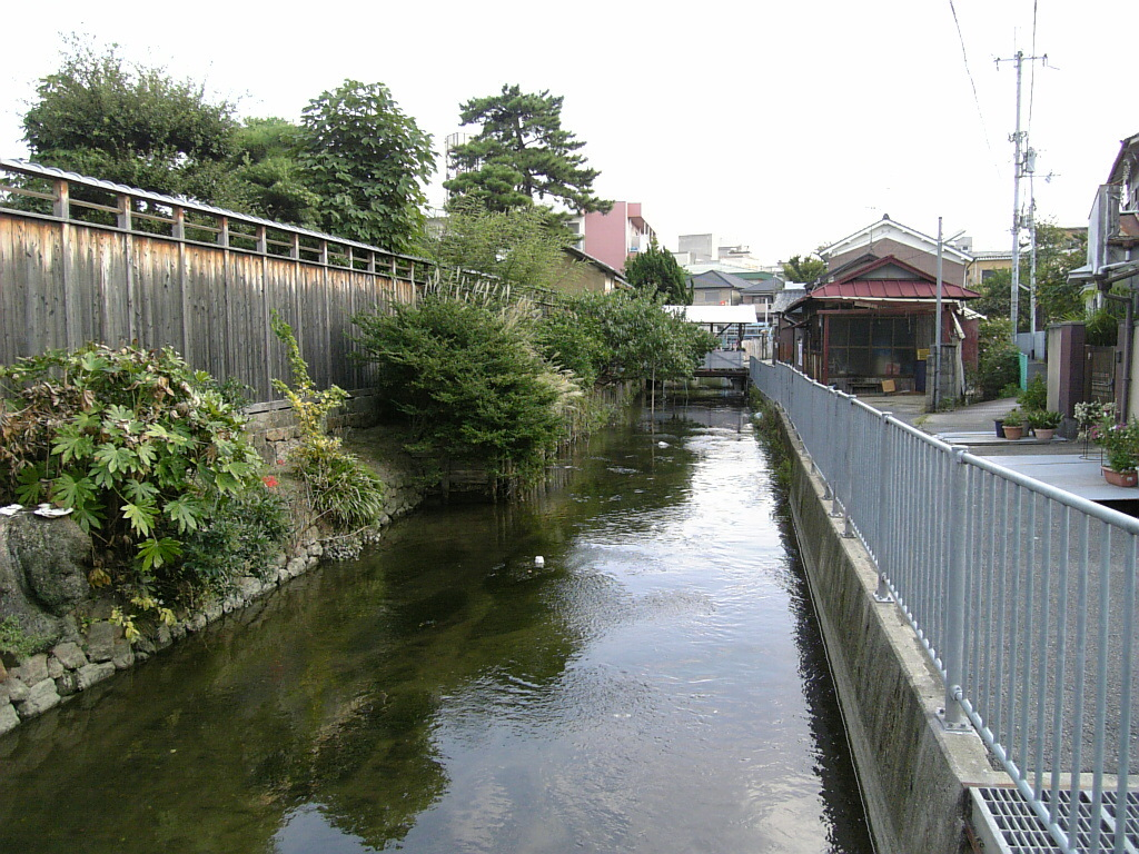 平野川（大阪府柏原市）